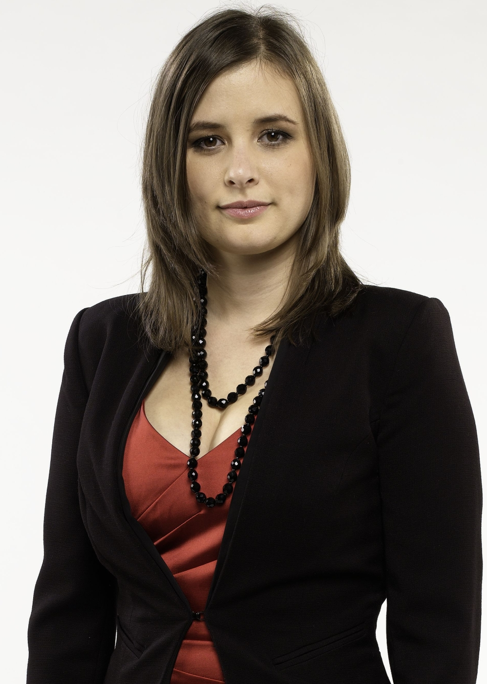 Dúró Dóra magyar politológus, nemzeti radikális politikus, 2010 óta a Jobbik Magyarországért Mozgalom országgyűlési képviselője, a párt Oktatási Kabinetjének elnöke, 2007-2014 között a Jobbik szóvivője. 2014 óta az Országgyűlés Kulturális bizottságának elnöke.